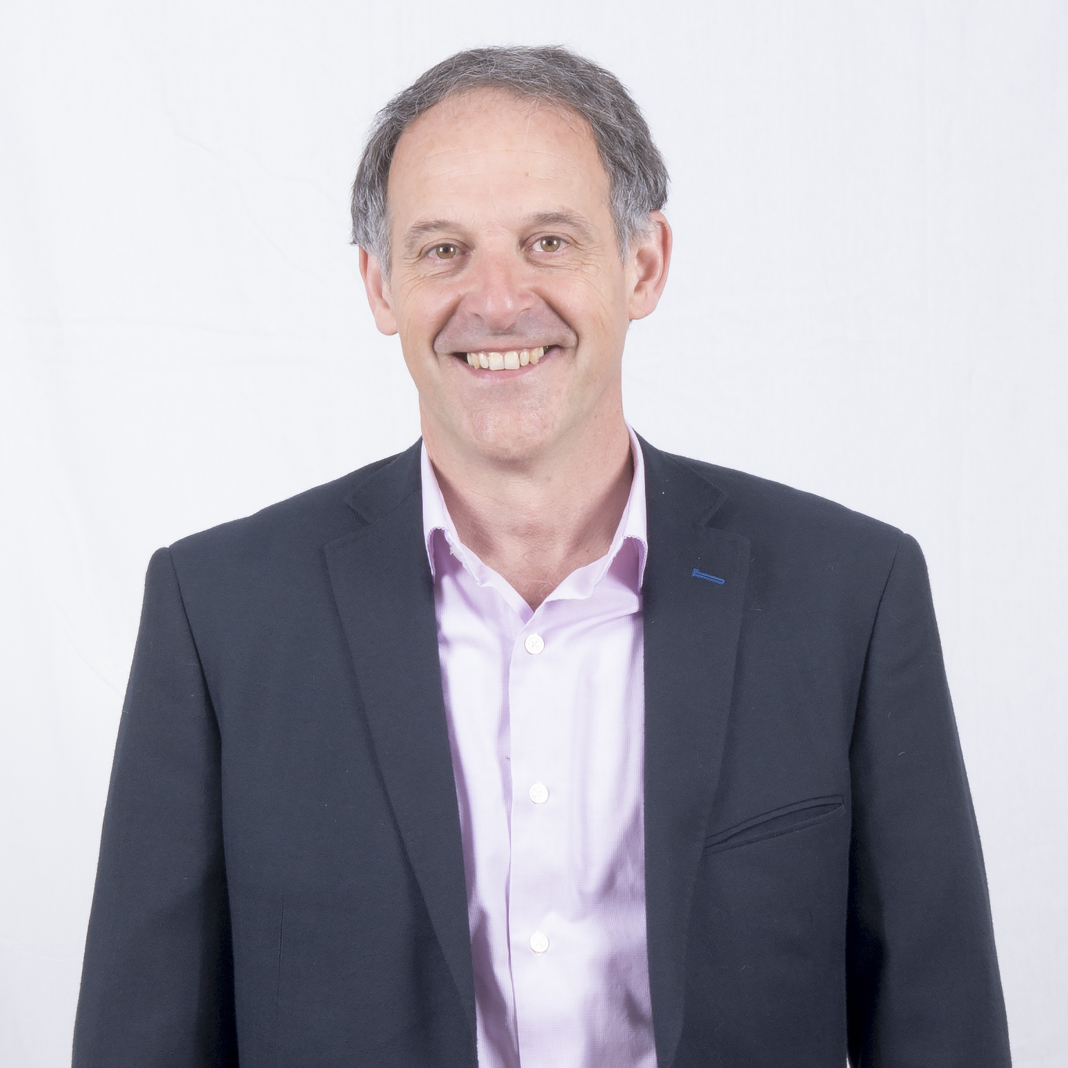 Adolfo Araiz en 2015.